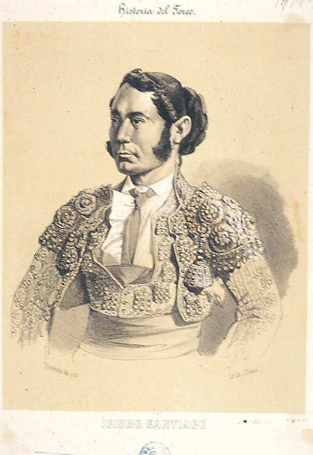 Isidro Santiago (Barragán), litografía de Vicente Urrabieta. Ilustración de "Historia del toreo" de F. G. Bedoya, Madrid, 1850. Biblioteca Nacional de España.